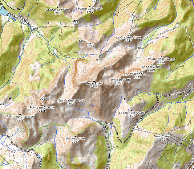 carte réalisée sur umap This map may be incomplete, and may contain errors. Don't rely solely on it for navigation.